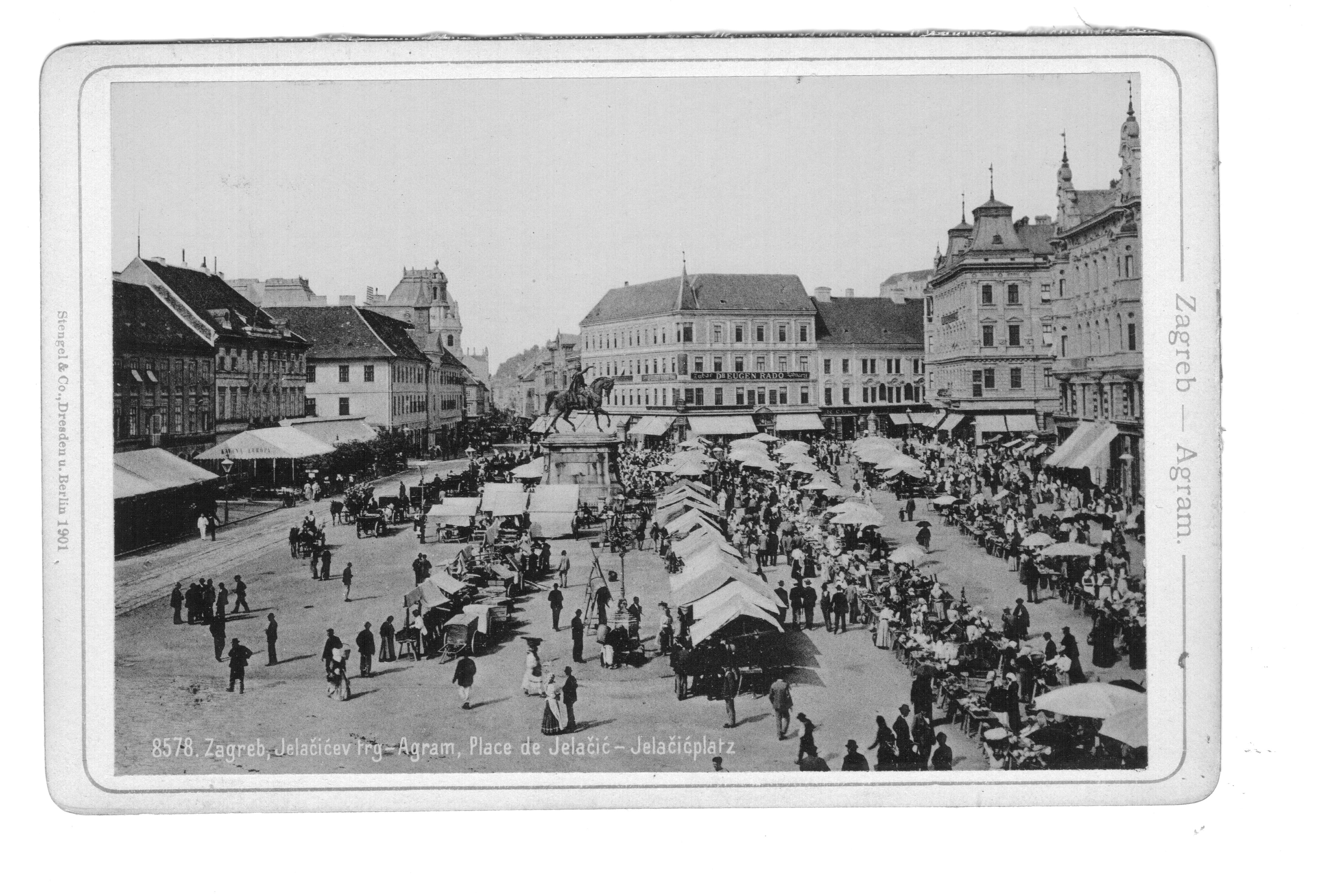 Osztrák-Magyar Monarchia, Zágráb. A Zágráb című fényképalbum 20, fehér kartonsorozatra ragasztott, fehér vászonnal összefűzött fényképéből. ©© Megjelent Creative Commons alatt a Metapolisz sorozatban. A Metapolisz sorozat valamennyi képe és filmje Creative Commons alatti valamint kereskedelmi - for profit - célra is felhasználható. Ajánlott hivatkozás: Derzsi Elekes Andor: Metapolisz DVD line ©© Published under Creative Commons in the Metapolisz DVD line. All of the photos and vids in the Metapolisz DVD line are under Creative Commons and can be used even for commercial – for profit – purposes. Recommended Citation Derzsi Elekes Andor: Metapolisz DVD line